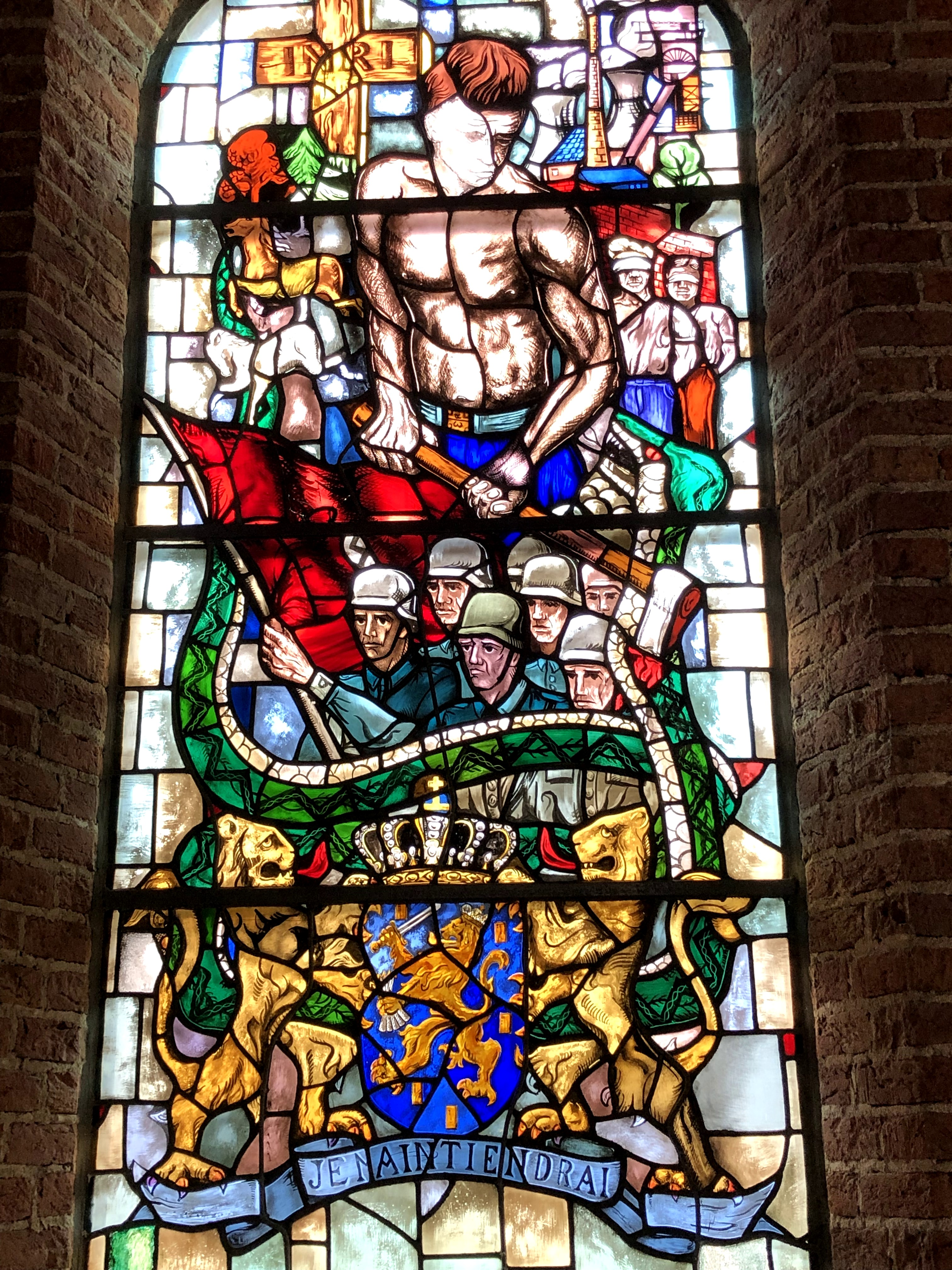 Op dit raam staat een arbeider centraal die omringd wordt door Duitse militairen. Deze Duitsers dragen de vlag van het Derde Rijk en om hen heen is een donkergroene slang afgebeeld. Aan de onderkant is het rijkswapen van het Koninkrijk der Nederlanden te zien met daaronder de wapenspreuk 'Je Maintiendrai' wat 'Ik zal handhaven' betekent.